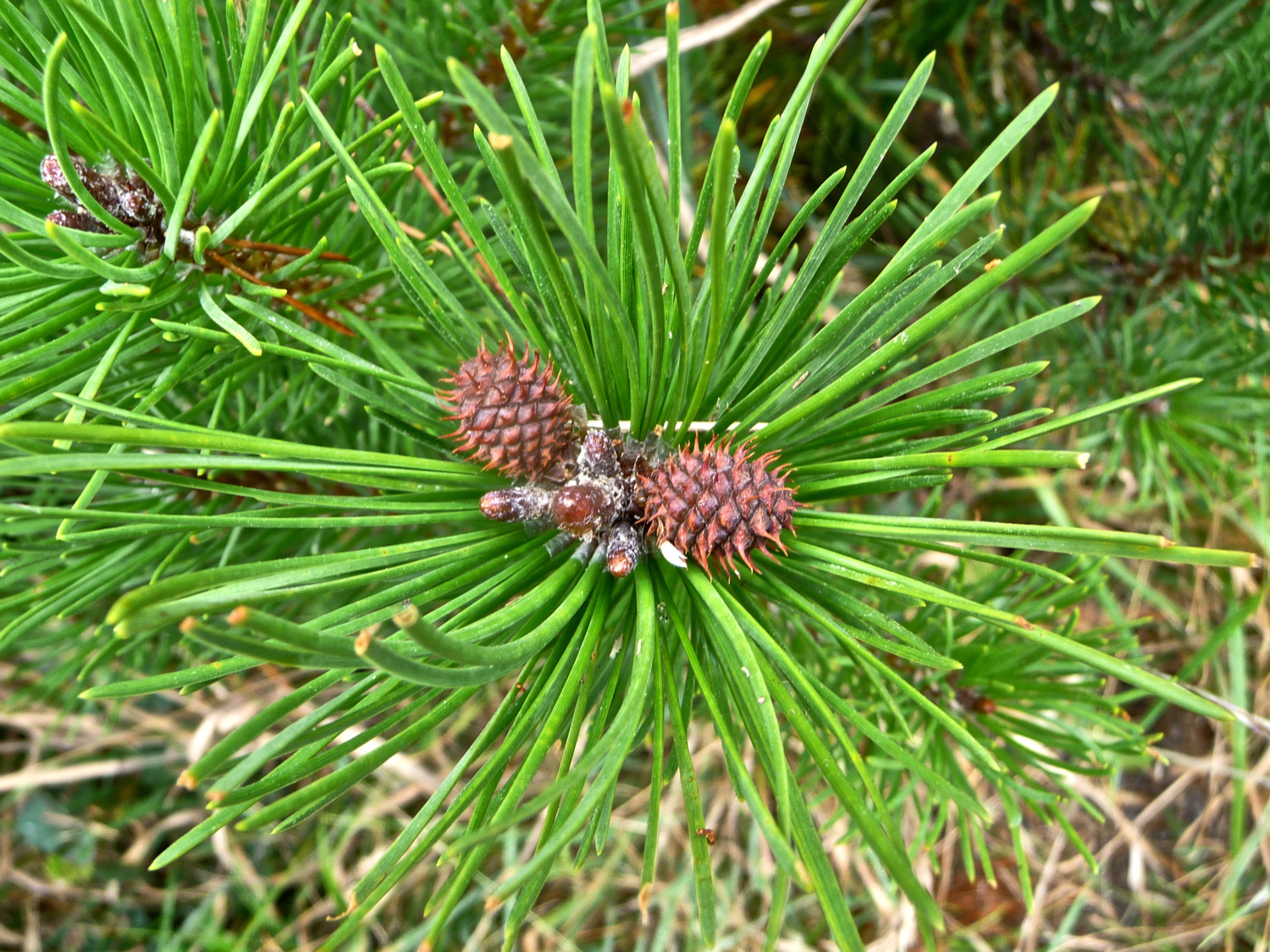 Pinus contorta var. bolanderi foliage and immature cones. Mendocino, California.